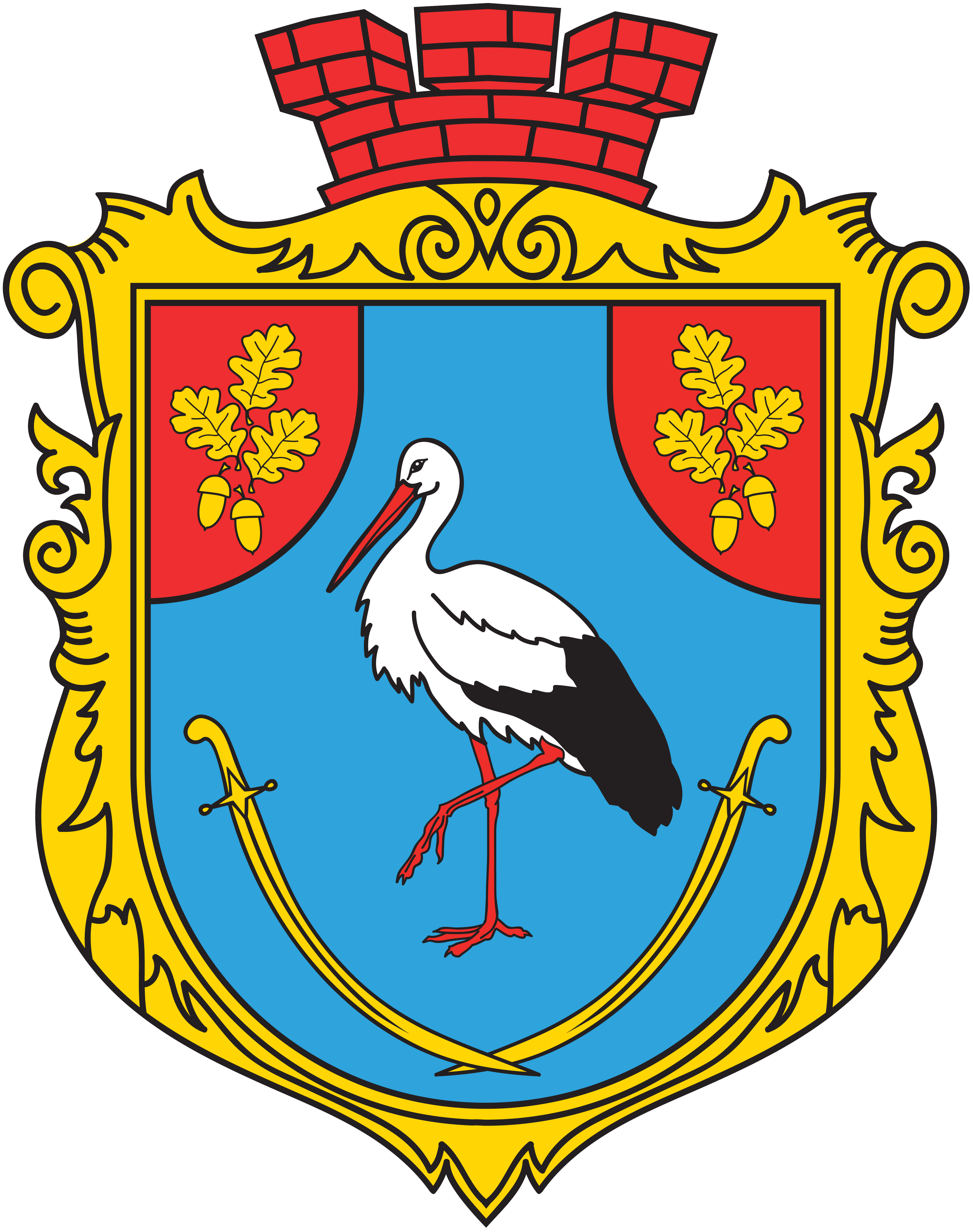 Герб Лихівської ОТГ